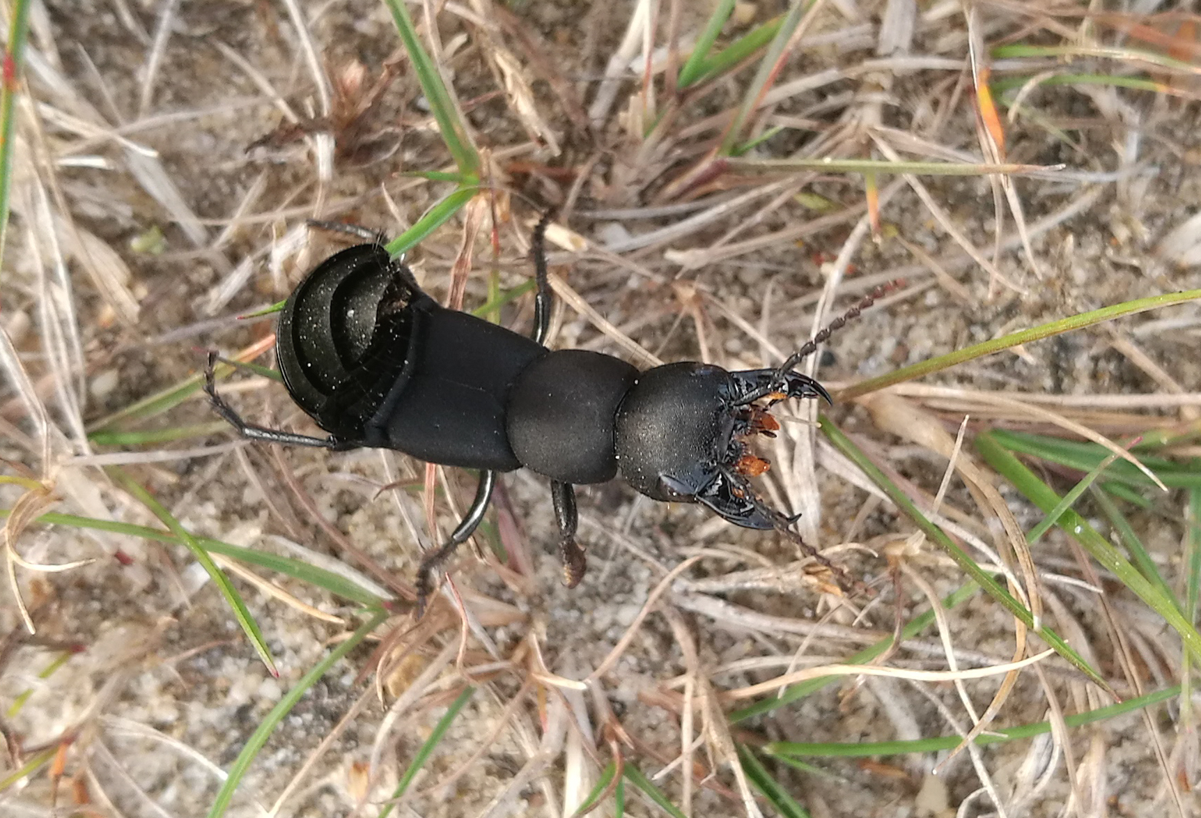 Vermutlich Dunkler Raubkäfer (Ocypus tenebricosus), Oktober 2016 Nationalpark Hoge Kempen, Belgien